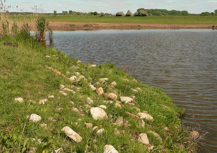 Uhlenburg Essel Pond with reinforcement to prevent erosion near site of Uhlenburg castle, Essel, Lower Saxony, Germany.